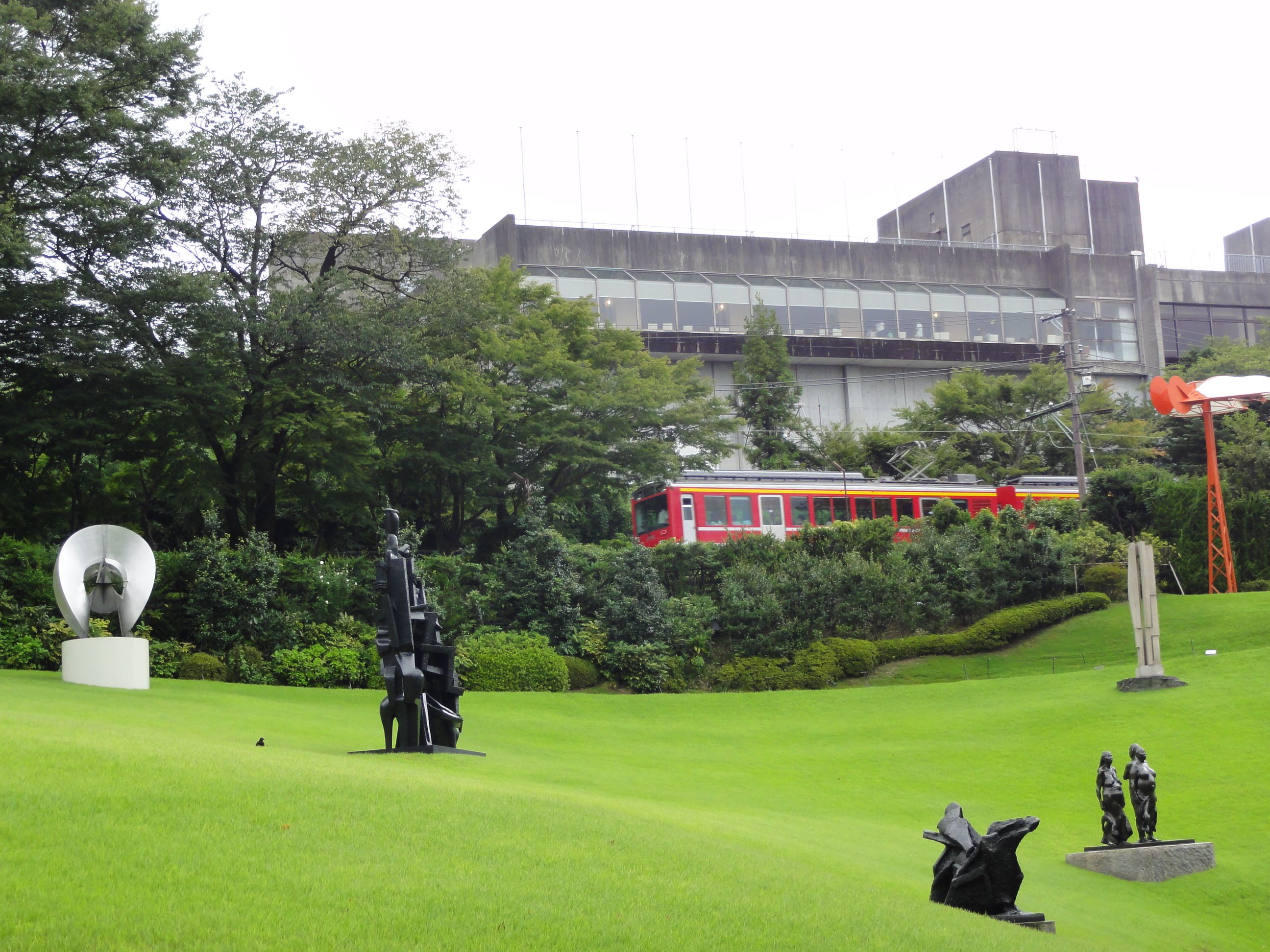 箱根 彫刻の森美術館と箱根登山鉄道